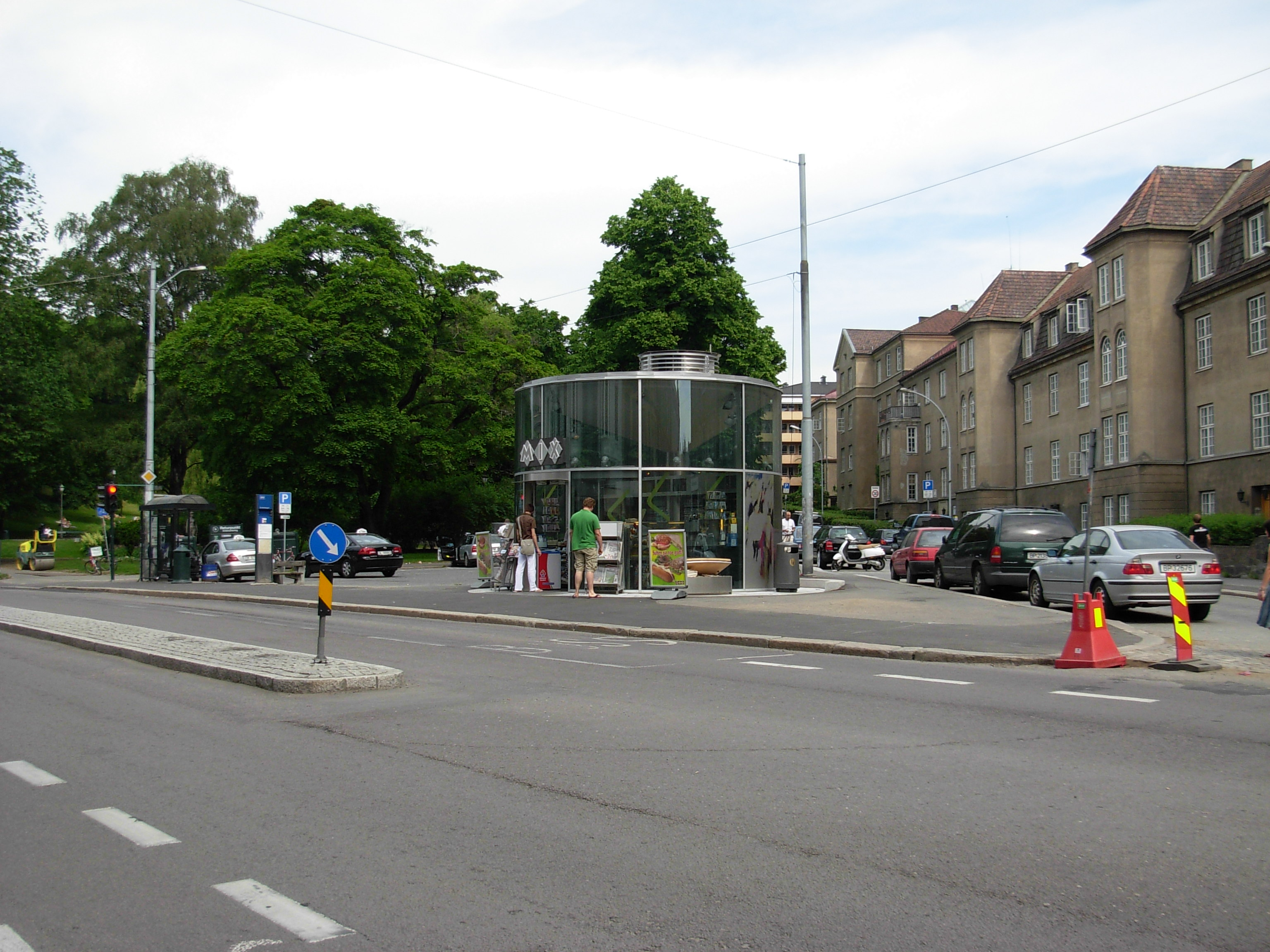 Knud Knudsens plass, St. Hanshaugen, Oslo, Norway